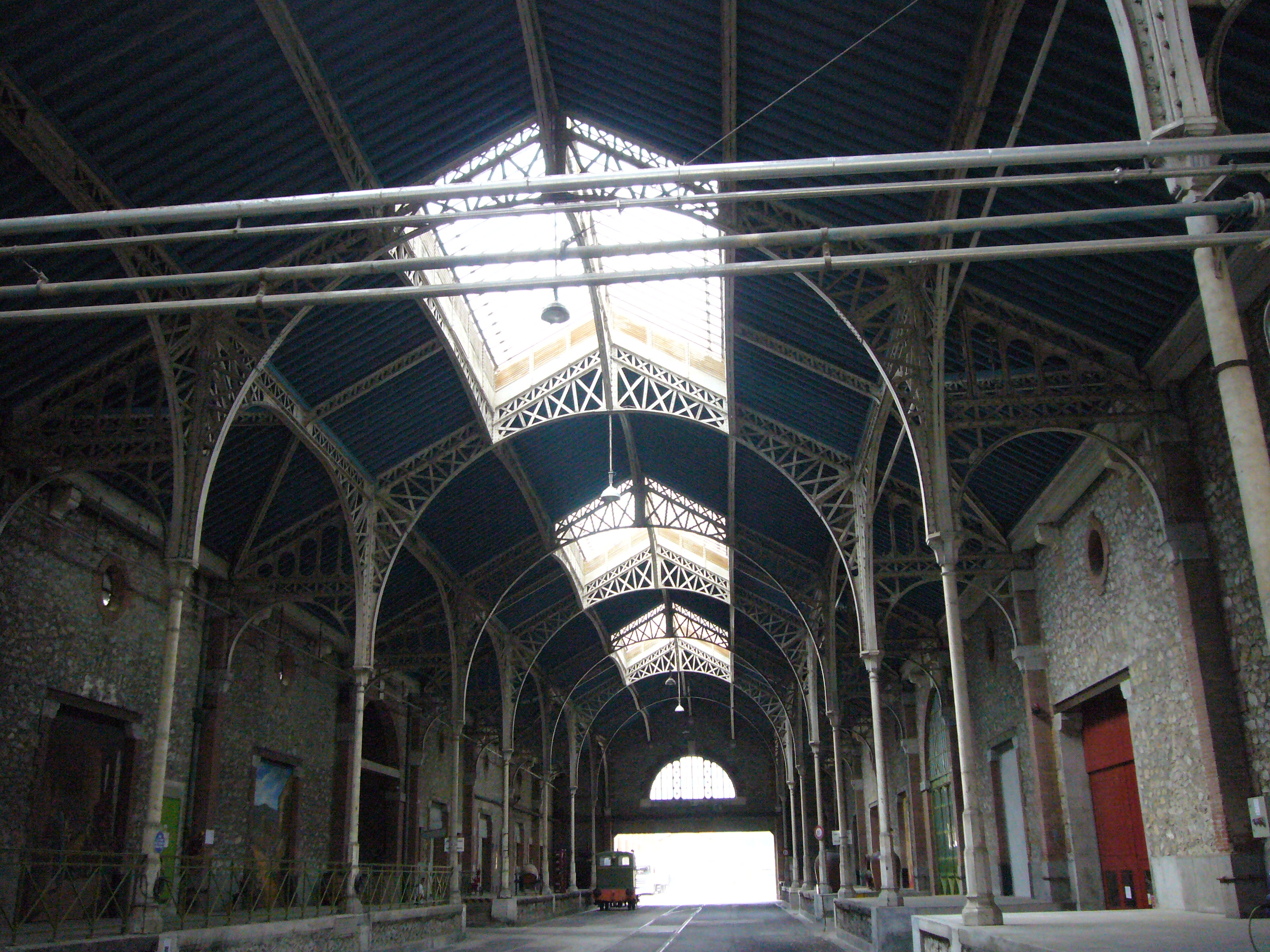 Les établissements Byrrh à Thuir (Pyrénées-Orientales, France), charpente réalisée par les ateliers de Gustave Eiffel